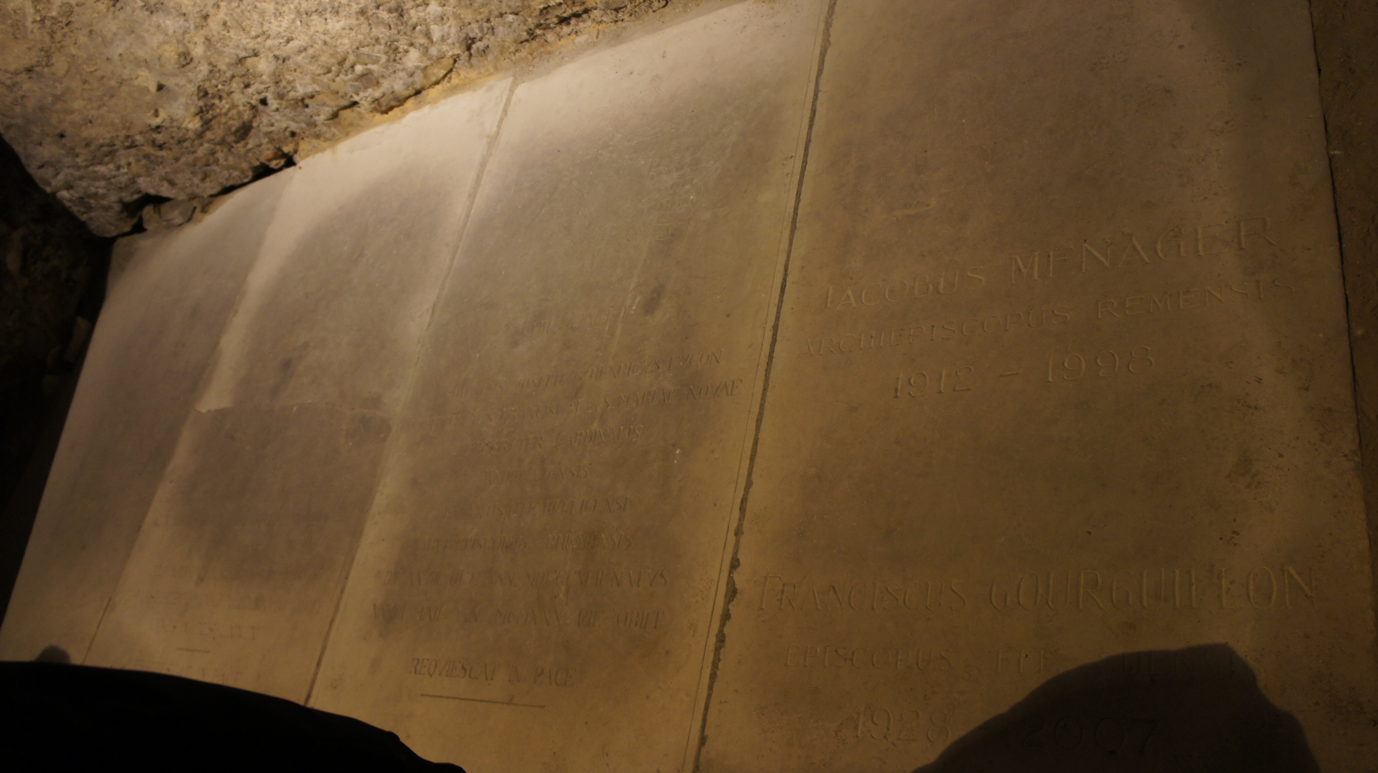 Dans la Crypte de la première basilique en 401 les gisants des archeveques. This building is indexed in the Base Mérimée, a database of architectural heritage maintained by the French Ministry of Culture, under the references PA00078776 and église .